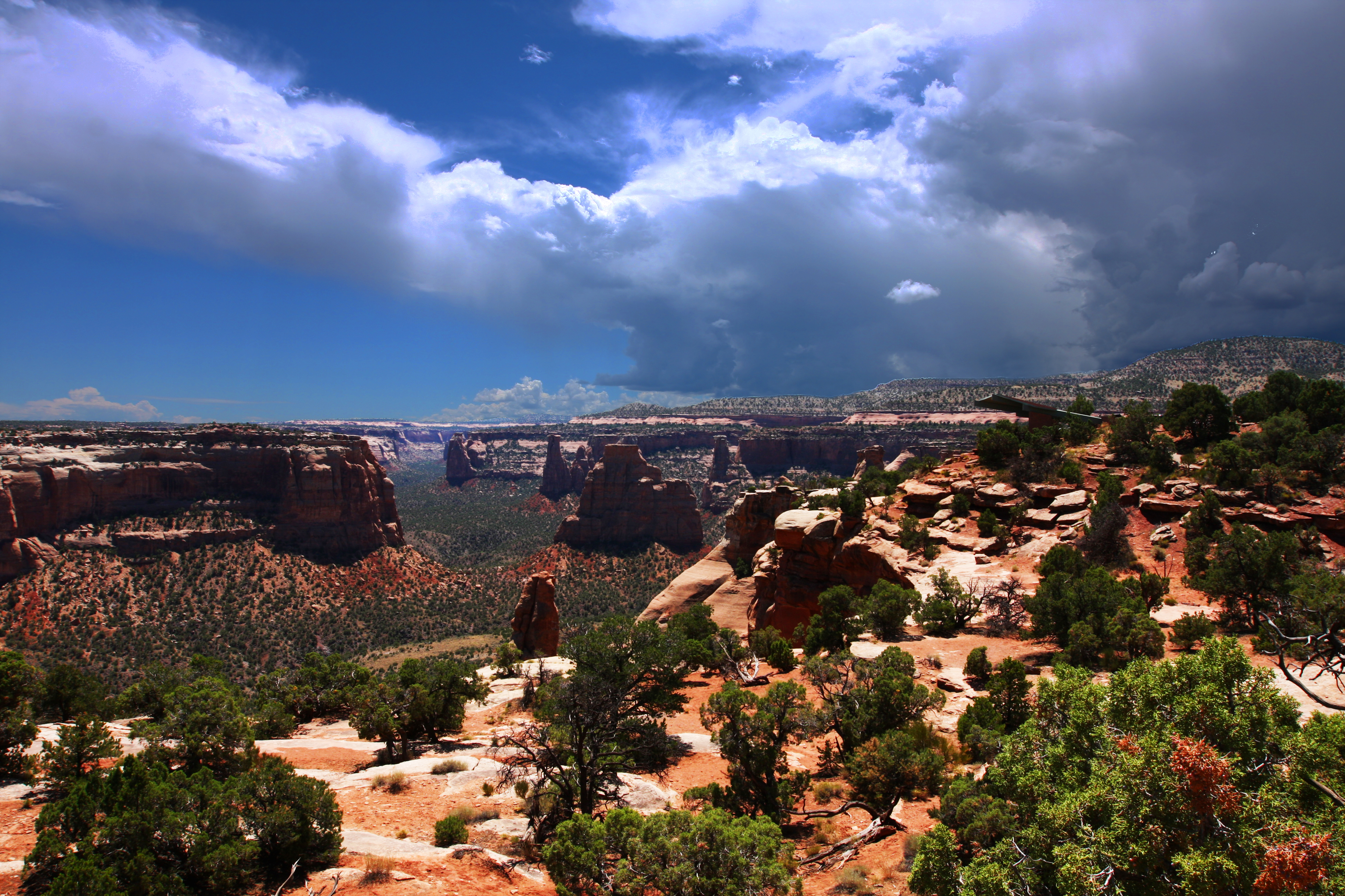 Colorado National Monument